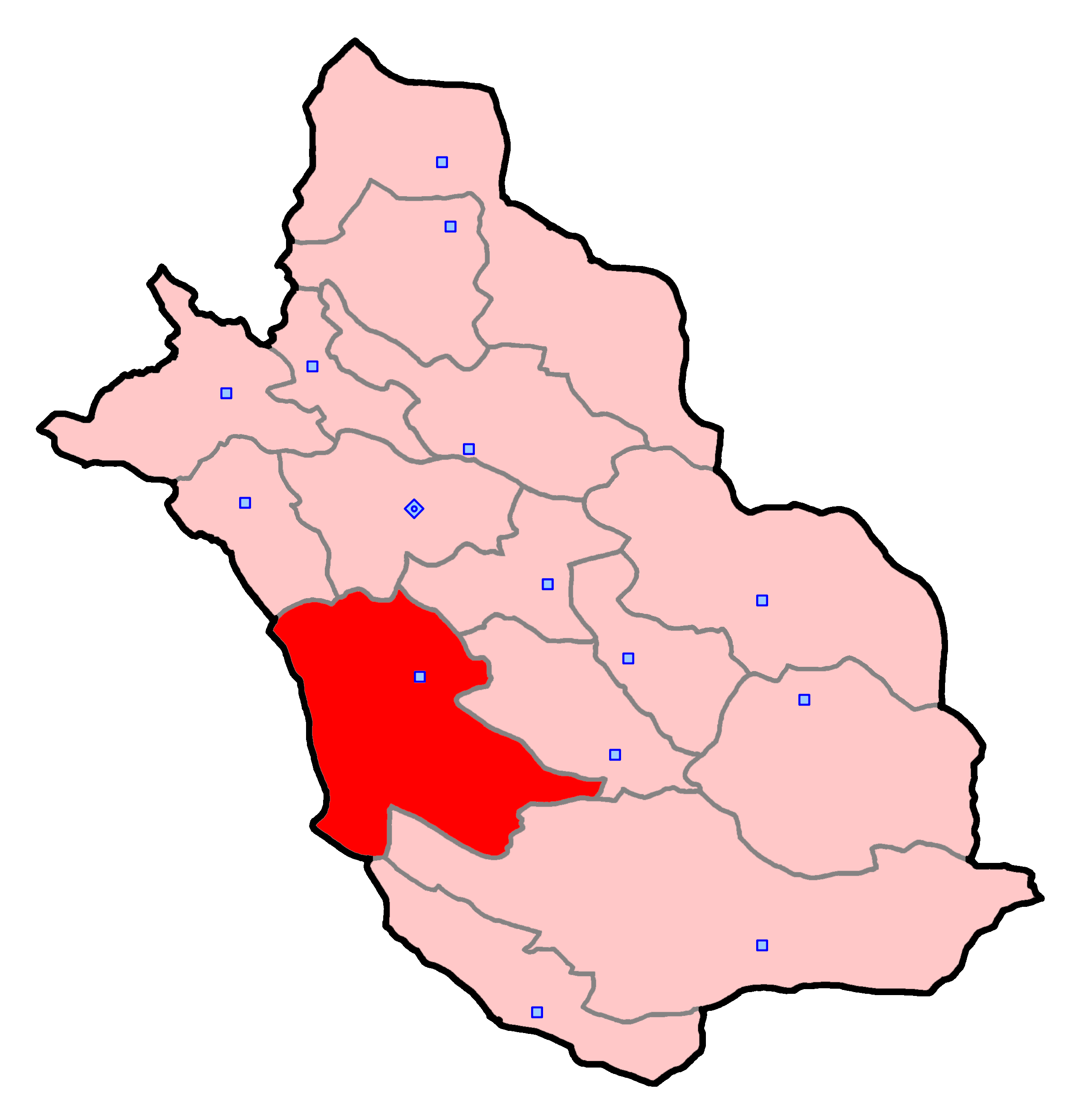 حوزهٔ انتخاباتی فیروزآباد و فراشبند و قیر و کازرین برای انتخابات مجلس شورای اسلامی